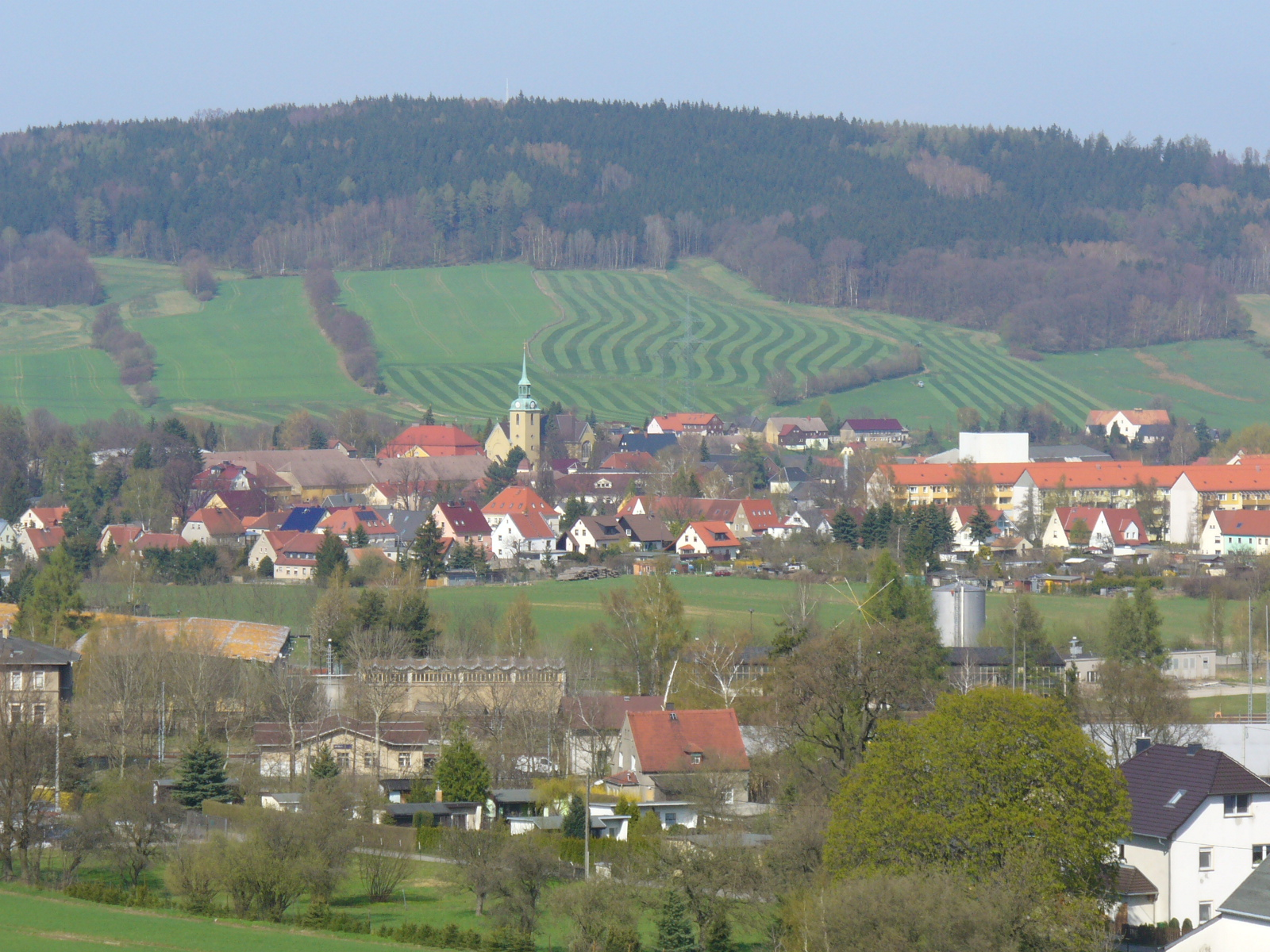 Wilthen. Blick aus Richtung Süd